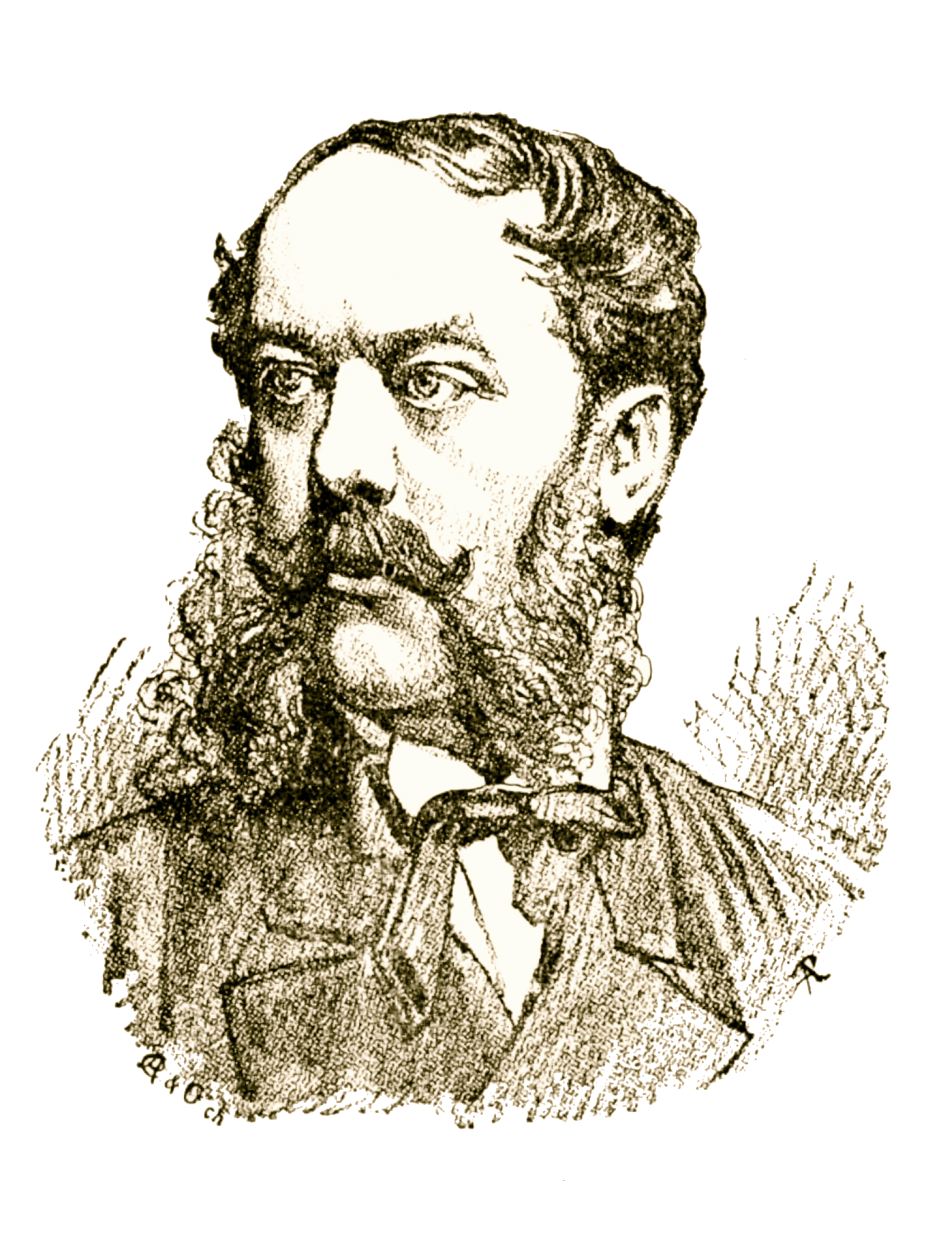 Gustav Freiherr von Suttner (1826-1900)